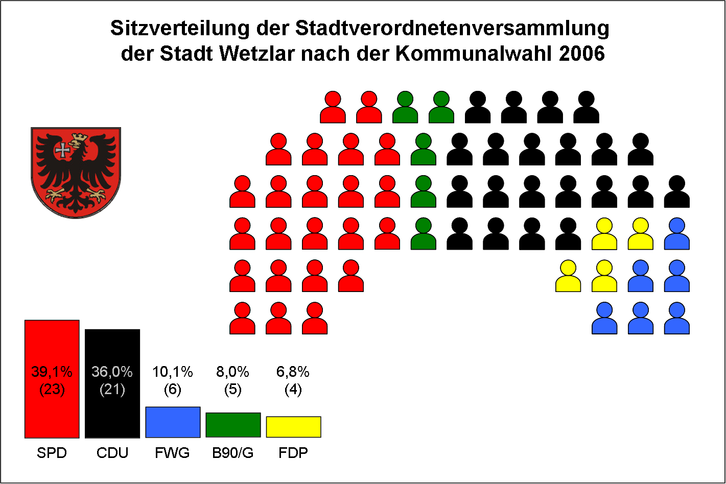 Sitzverteilung der Stadtverordnetenversammlung von Wetzlar 2006